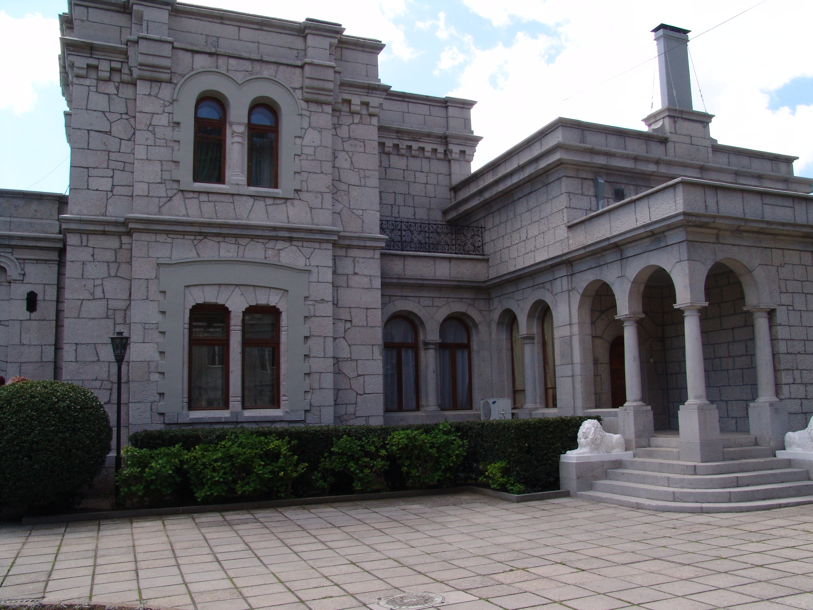 Главный корпус Юсуповского дворца. Кореиз